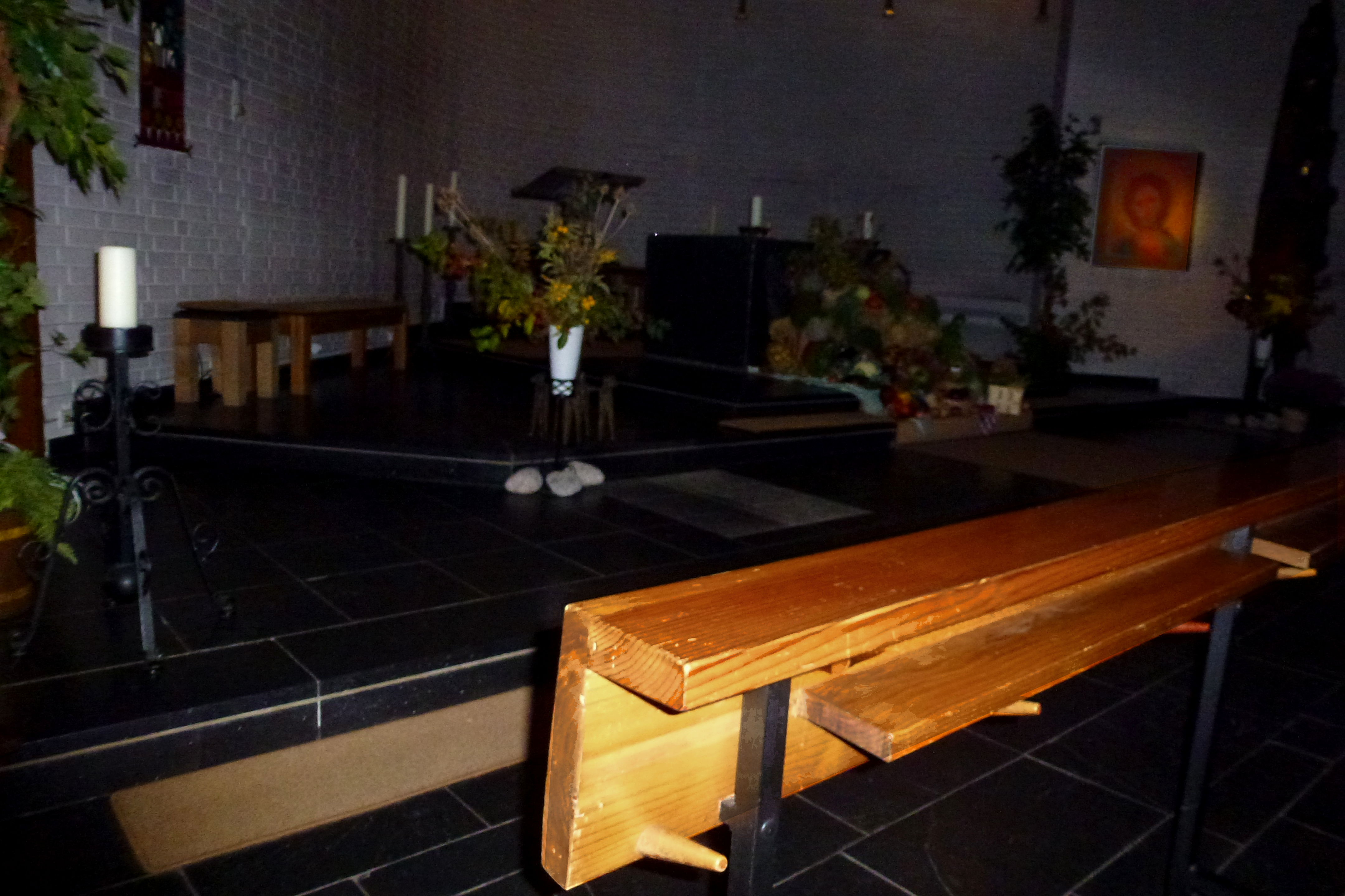 St.Augustinus Willingen Altarraum.